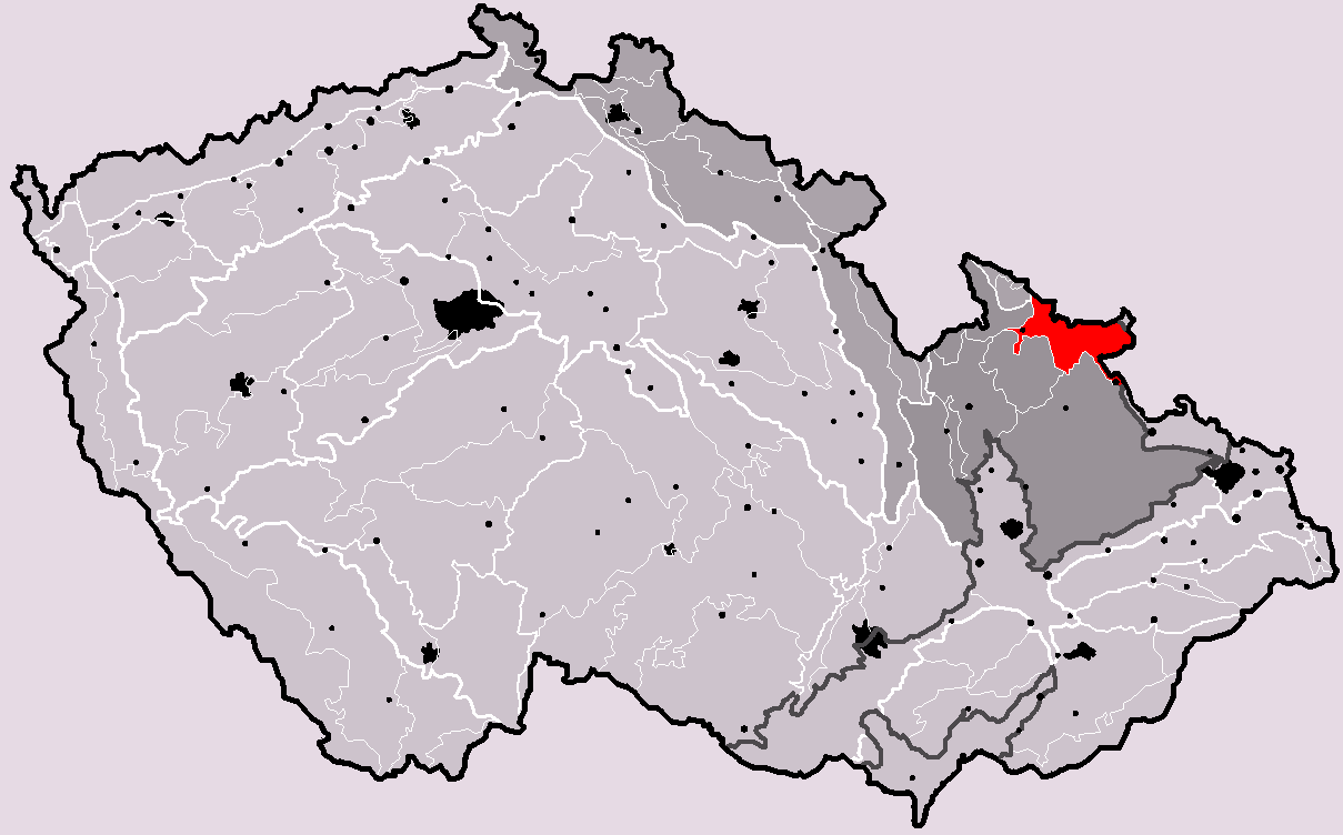 Poloha geomorfologického celku Zlatohorská vrchovina v rámci České republiky. Hercynský systém Hercynská pohoří I Česká vysočina I4 (IV) Krkonošsko-jesenická subprovincie I4C (IVC) Jesenická oblast I4C-1 (IVC-1) Zlatohorská vrchovina